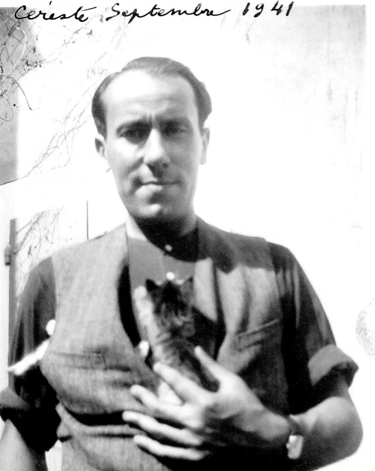 Char et son chat en 1941 à Céreste